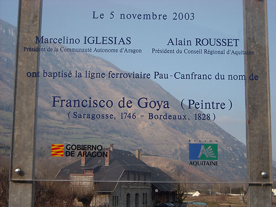 Panneau marquant le baptême de la ligne Goya en 2003.